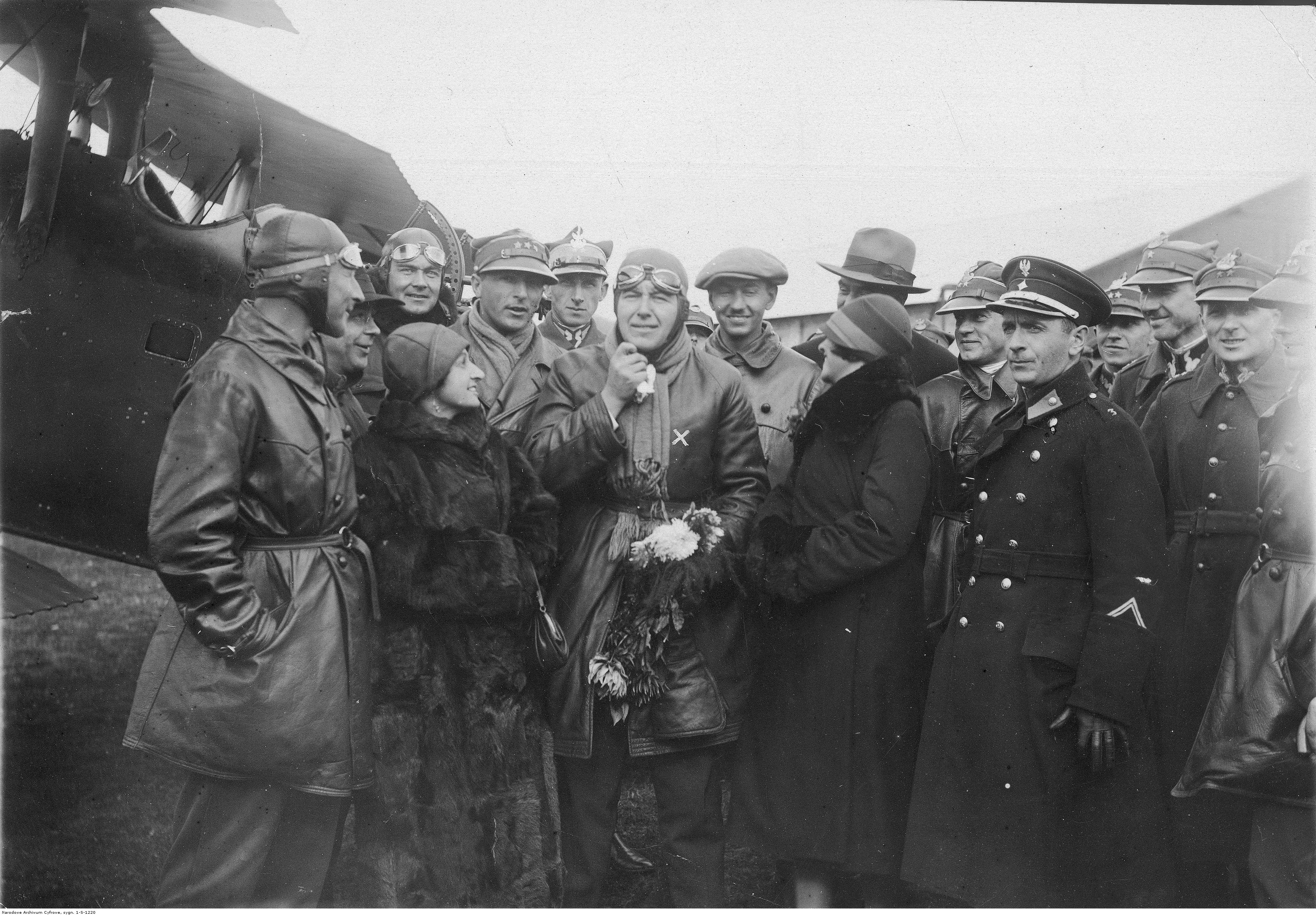 Powitanie kapitana Bolesława Orlińskiego w 5 pułku lotniczym w Lidzie po powrocie z lotu Warszawa-Tokio; 1926 r. Koncern Ilustrowany Kurier Codzienny - Archiwum Ilustracji. Sygnatura: 1-S-1220